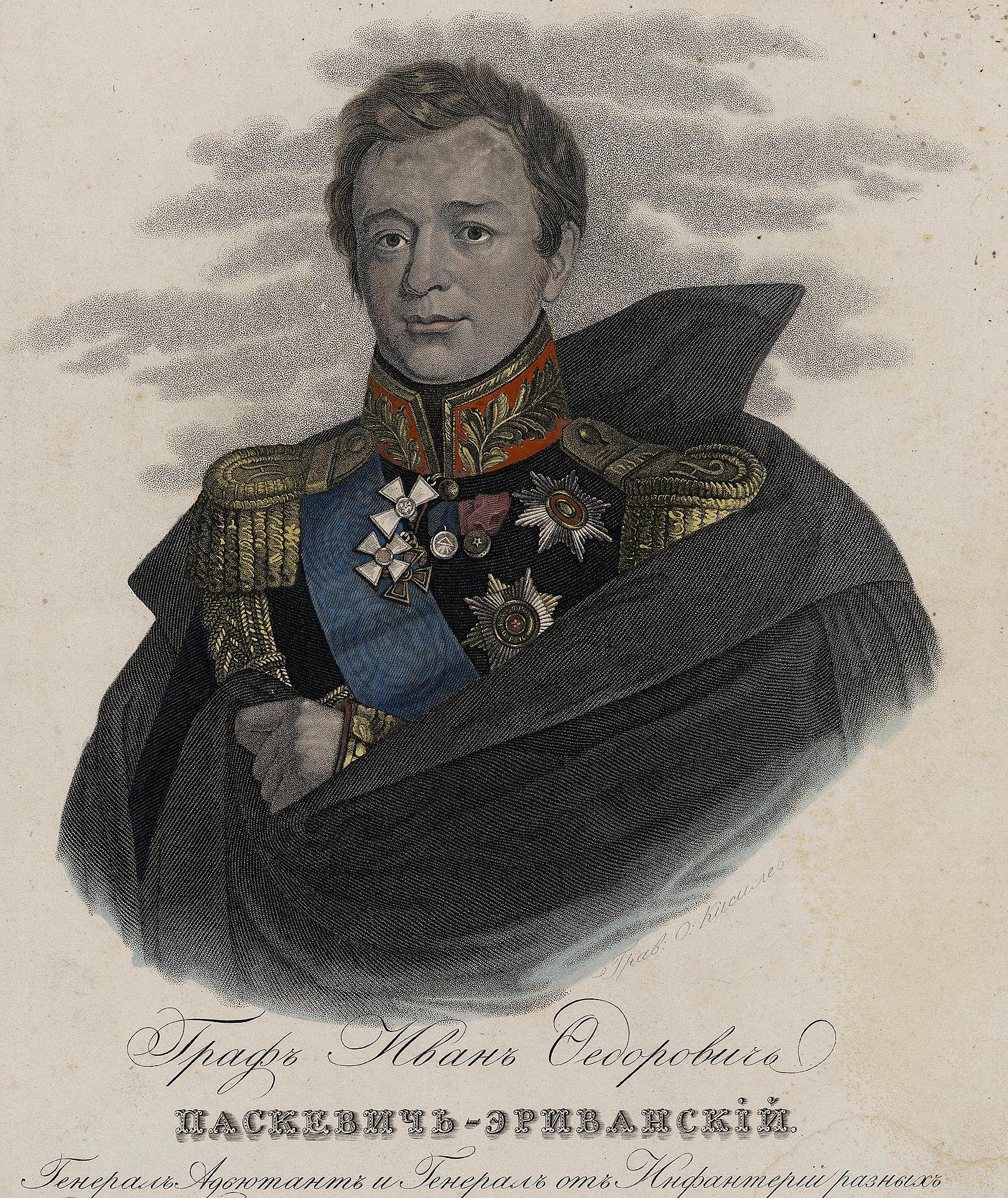 Портрет генерала, графа И.Ф. Паскевича